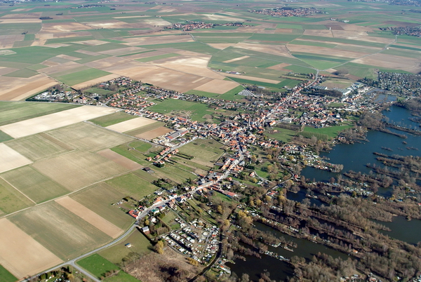 Photographie aérienne de la commune de Féchain